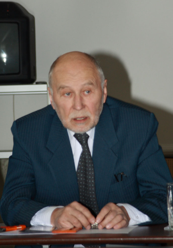 Rein Teesalu debatil "Kas 16-aastased noored peaksid saama valida või mitte?" Kuressaares